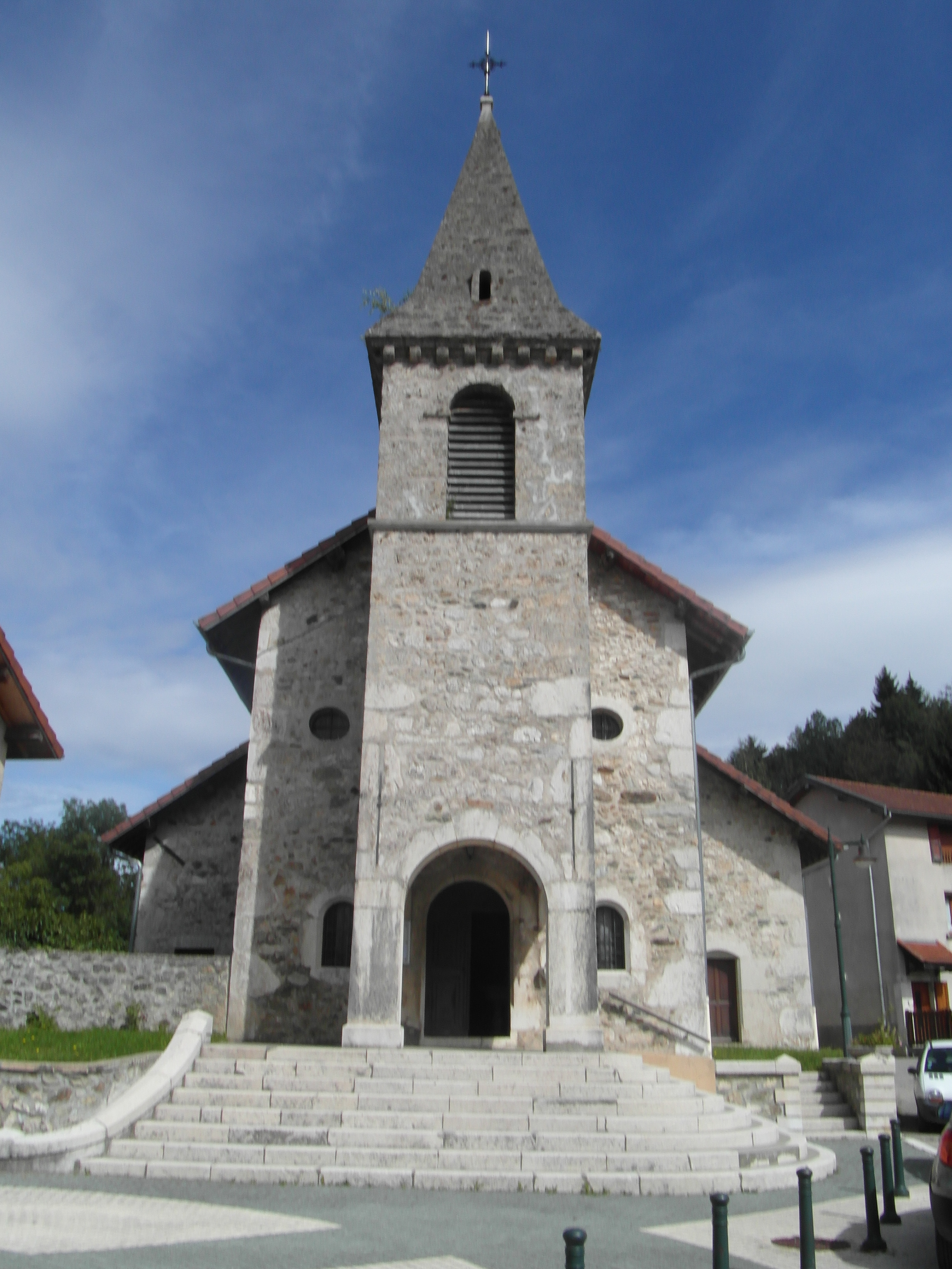 Eglise de Montaud